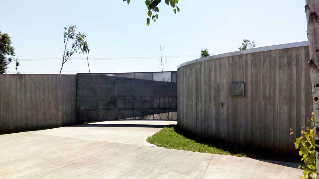 Centro de interpretación de Caldoval.